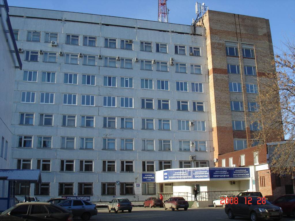 Фотография основного корпуса Больницы №1 Тольятти